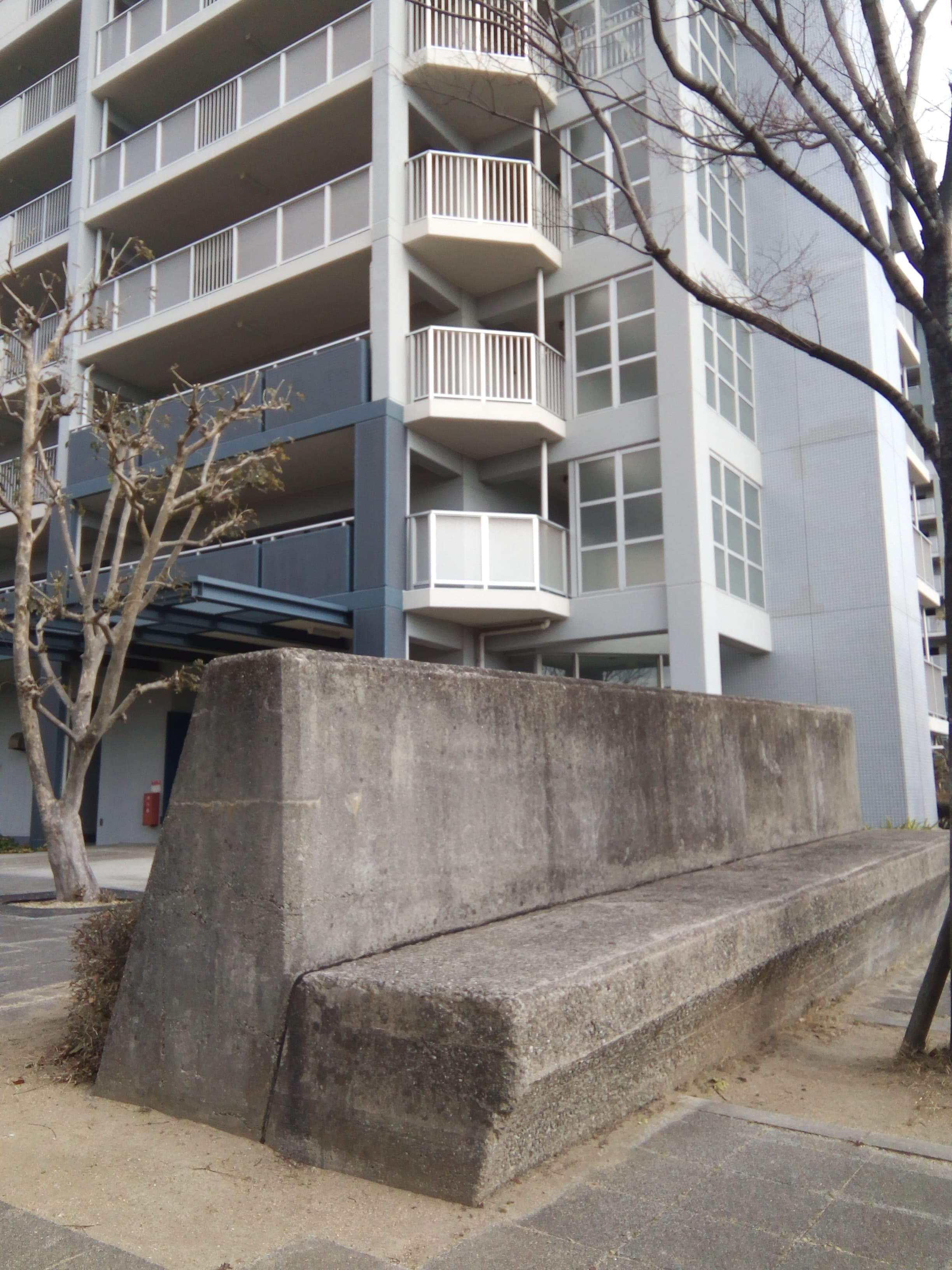 南芦屋浜団地コミュニティ＆アート作品（2009年1月撮影）